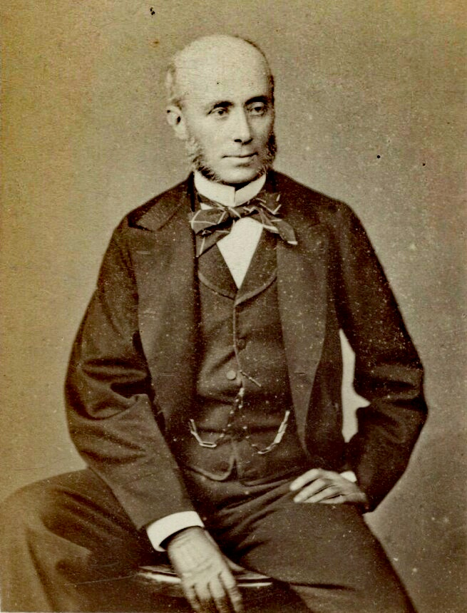 Vincent Benedetti (1817-1900)